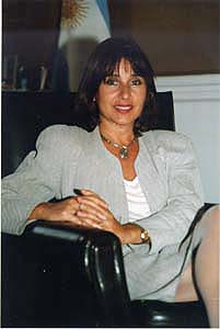 Susana Decibe